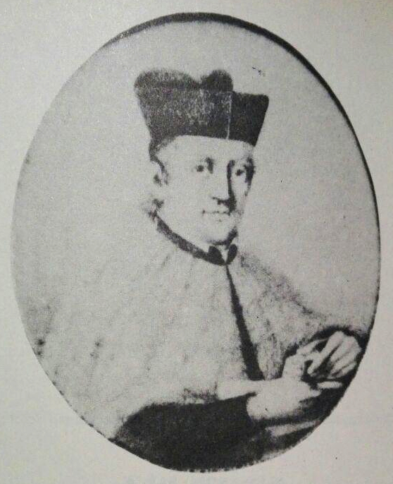 padre Alessandro Barca stampa